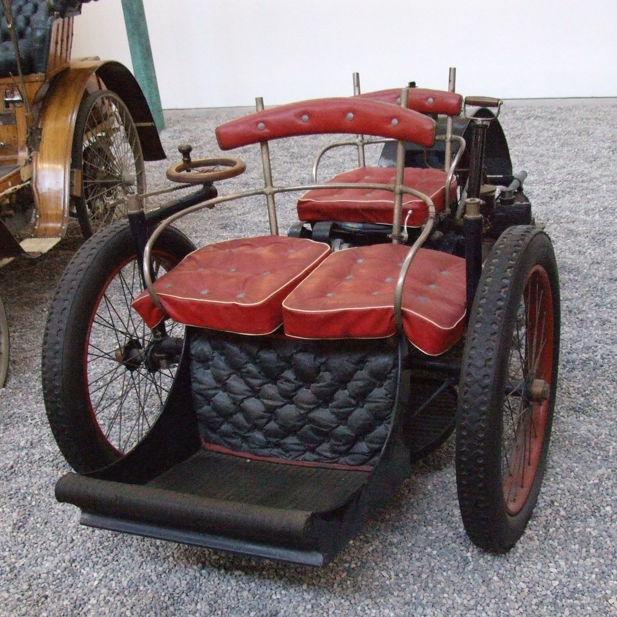 Das benzinbetriebene Dreirad Voiturette von Léon_Bollée, 1896; Damit legte er die Strecke Le Mans - Paris in sieben Stunden zurück. 650 ccm, Cité de l’Automobile – Musée National – Collection Schlumpf, Mülhausen, Frankreich